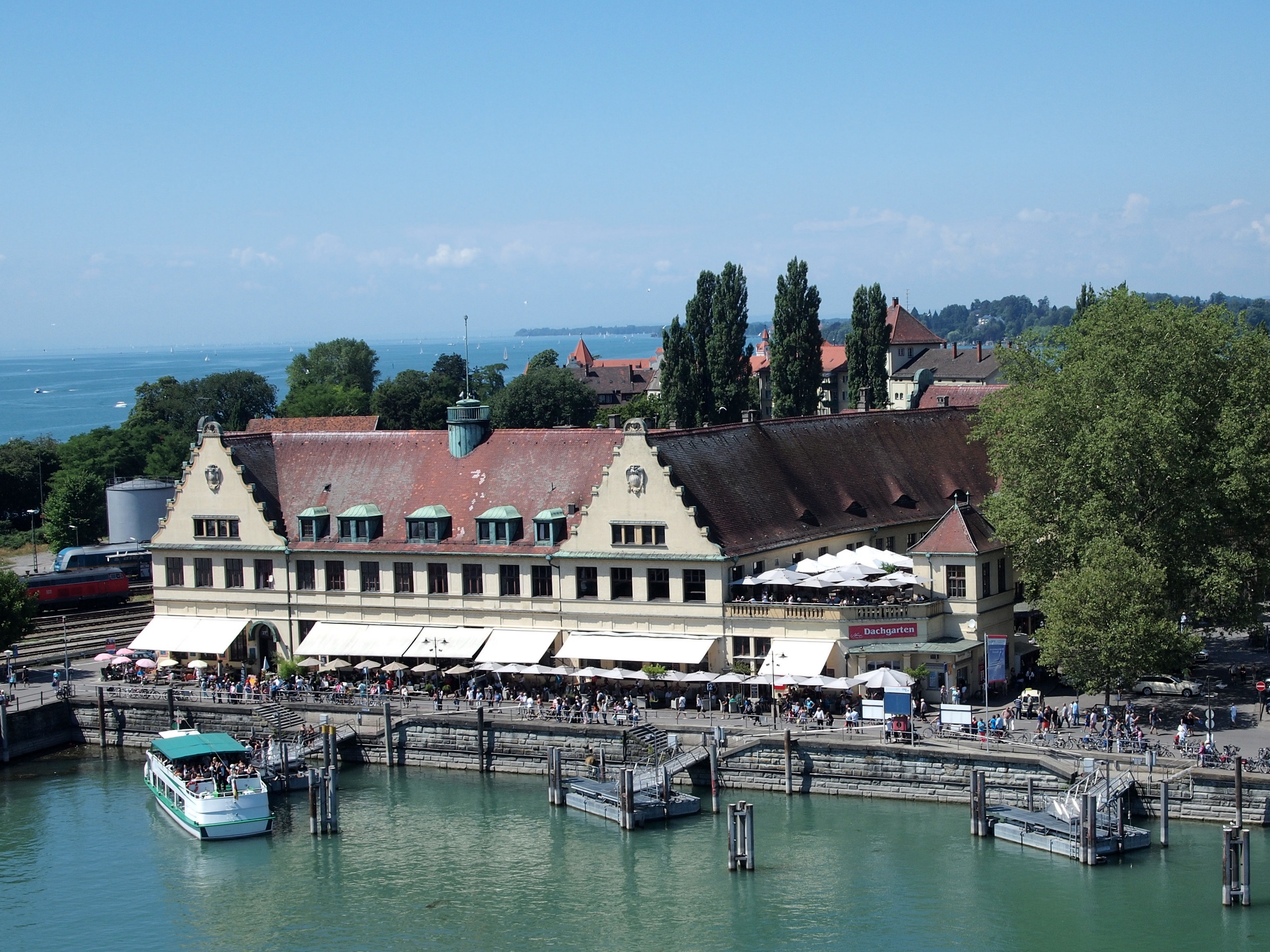 Lindauer Hauptbahnhofsgebäude aus Leuchtturmperspektive